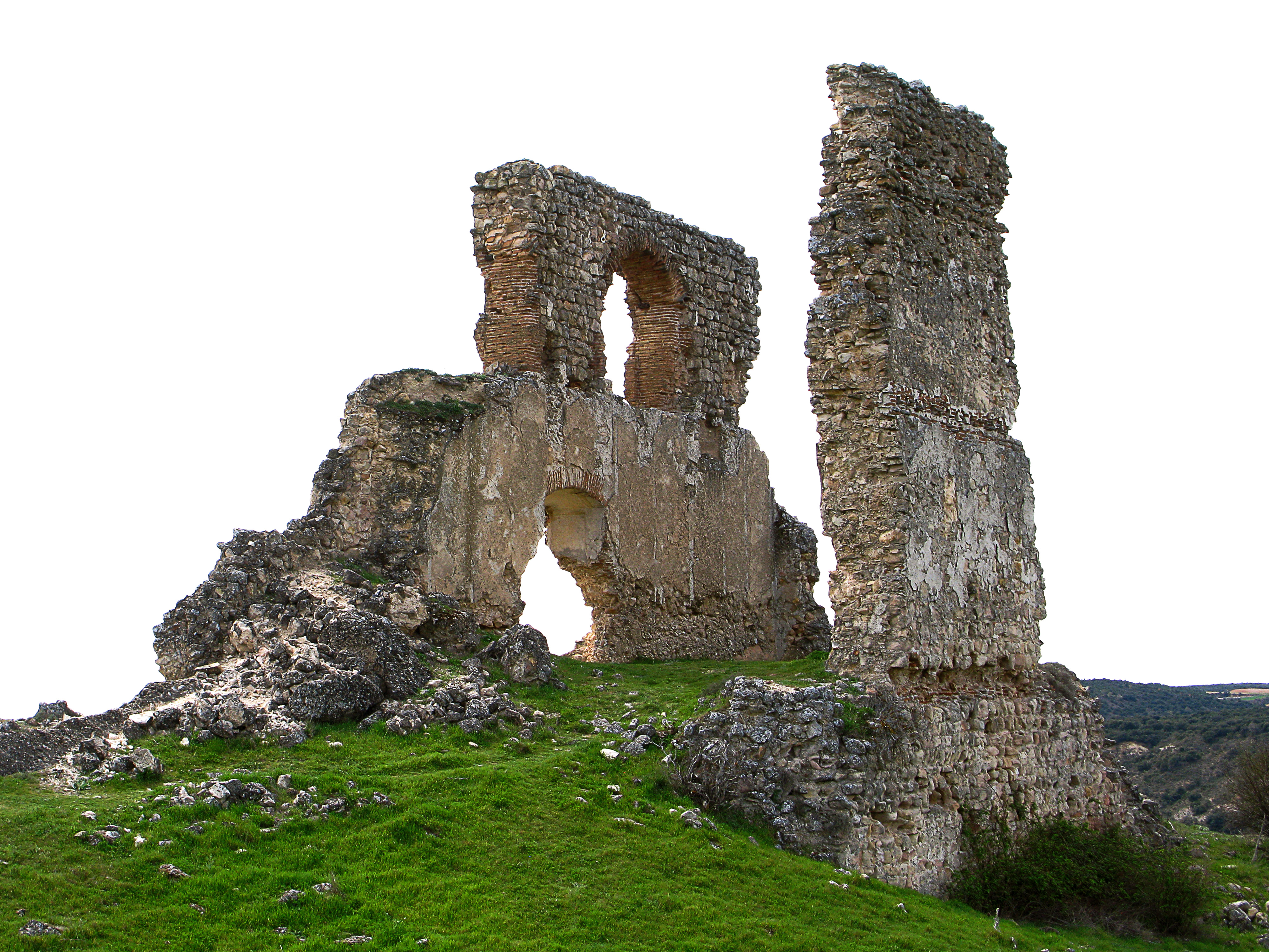 Los árabes construyeron una alcazaba en el actual emplazamiento del castillo. Las primeras referencias datan del año 1127. En las Relaciones Topográficas de Felipe II referentes a la localidad de Beleña de Sorbe se dice así: A los veinte y nueve capítulos dixeron, que hay en esta villa poco más alto un Castillo é Casa fuerte fundado sobre peña, que se llama el Castillo de Monilan, é que tiene salas en ella fundadas en peñasca...... hechas en ella, é lo demás materiales de cal é canto é ladrillo. Se encuentra en estado de ruina desde que fue abandonado, en el siglo XVII Sólo se conservan dos paredones con ventanas y los cimientos del patio de armas.